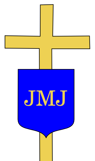 blason de la sainte famille de villefranche